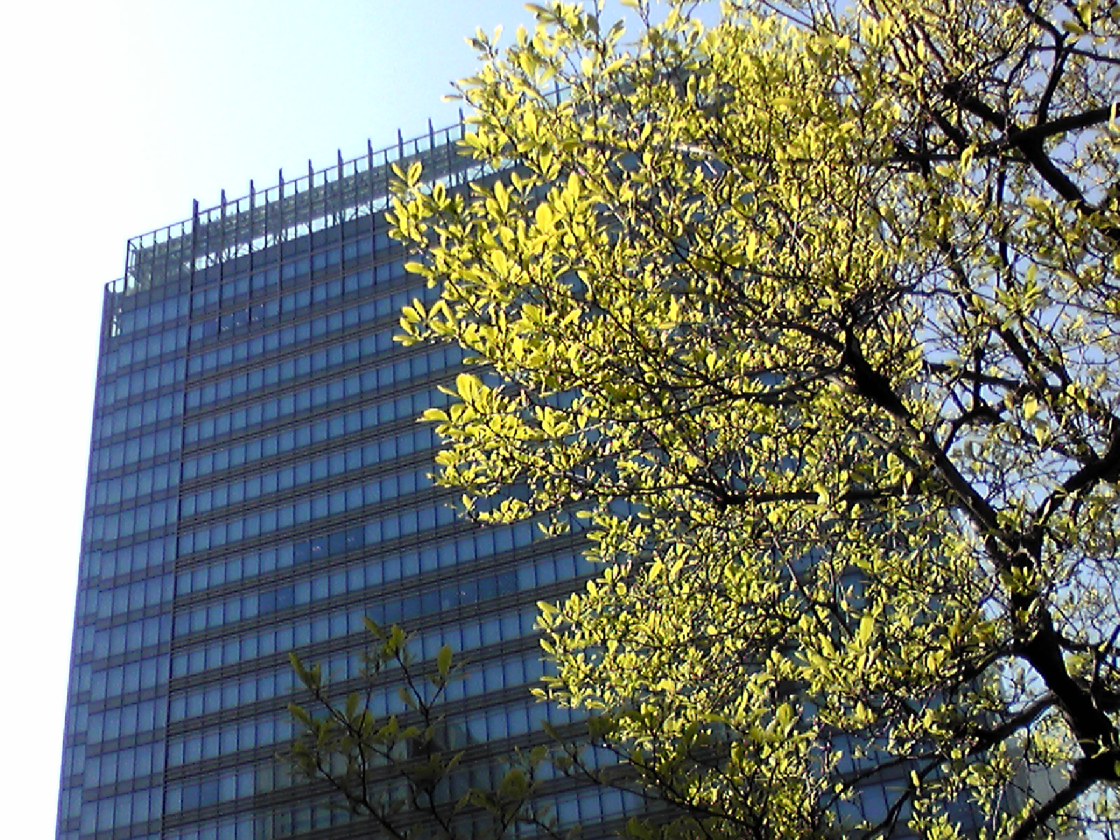 投稿者が撮影